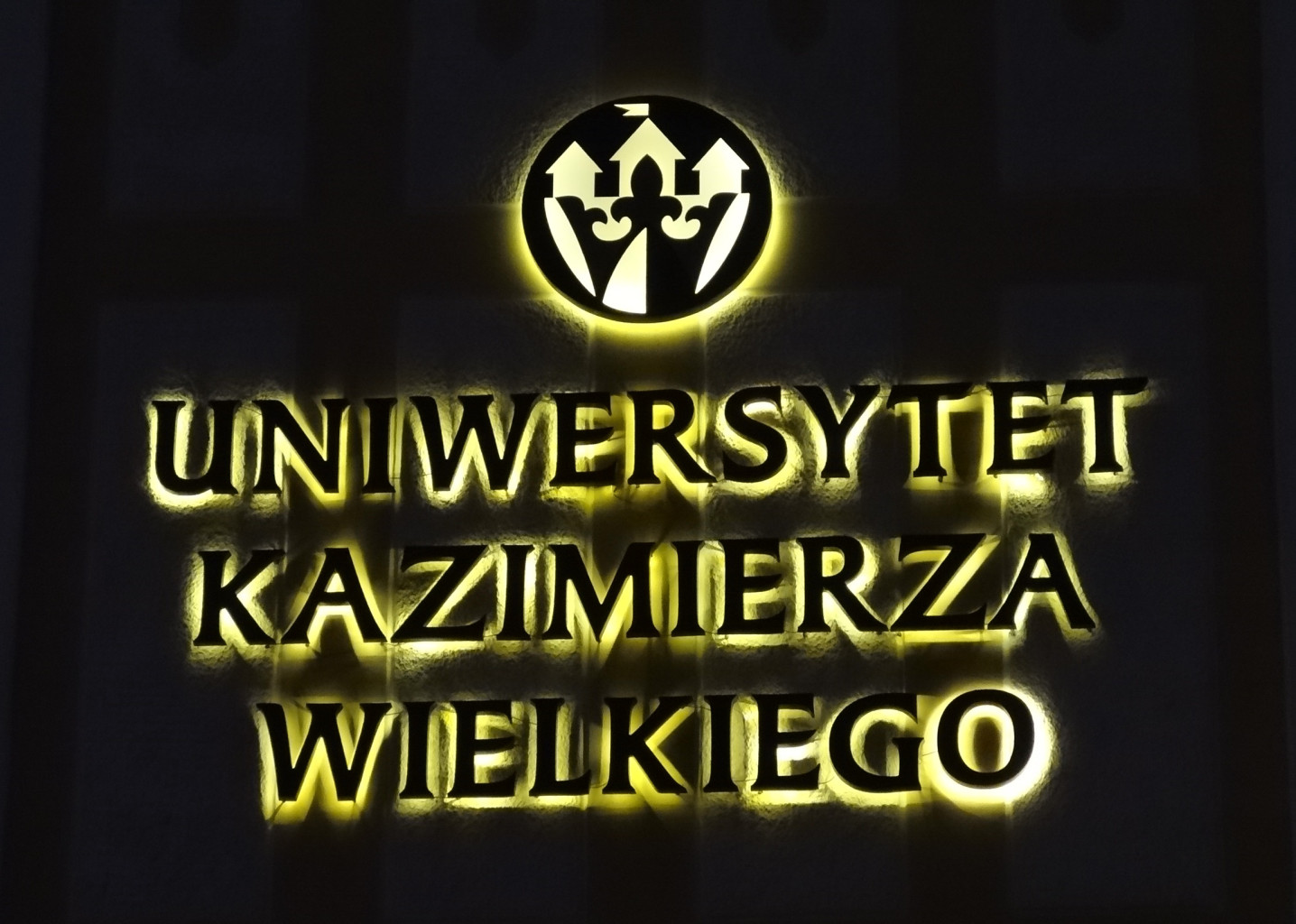 Budynek ul. Kopernika 1 w Bydgoszczy - dawna Miejska Szkoła Realna 1905-1907, ob. Collegium Copernicanum Uniwersytetu Kazimierza Wielkiego w Bydgoszczy